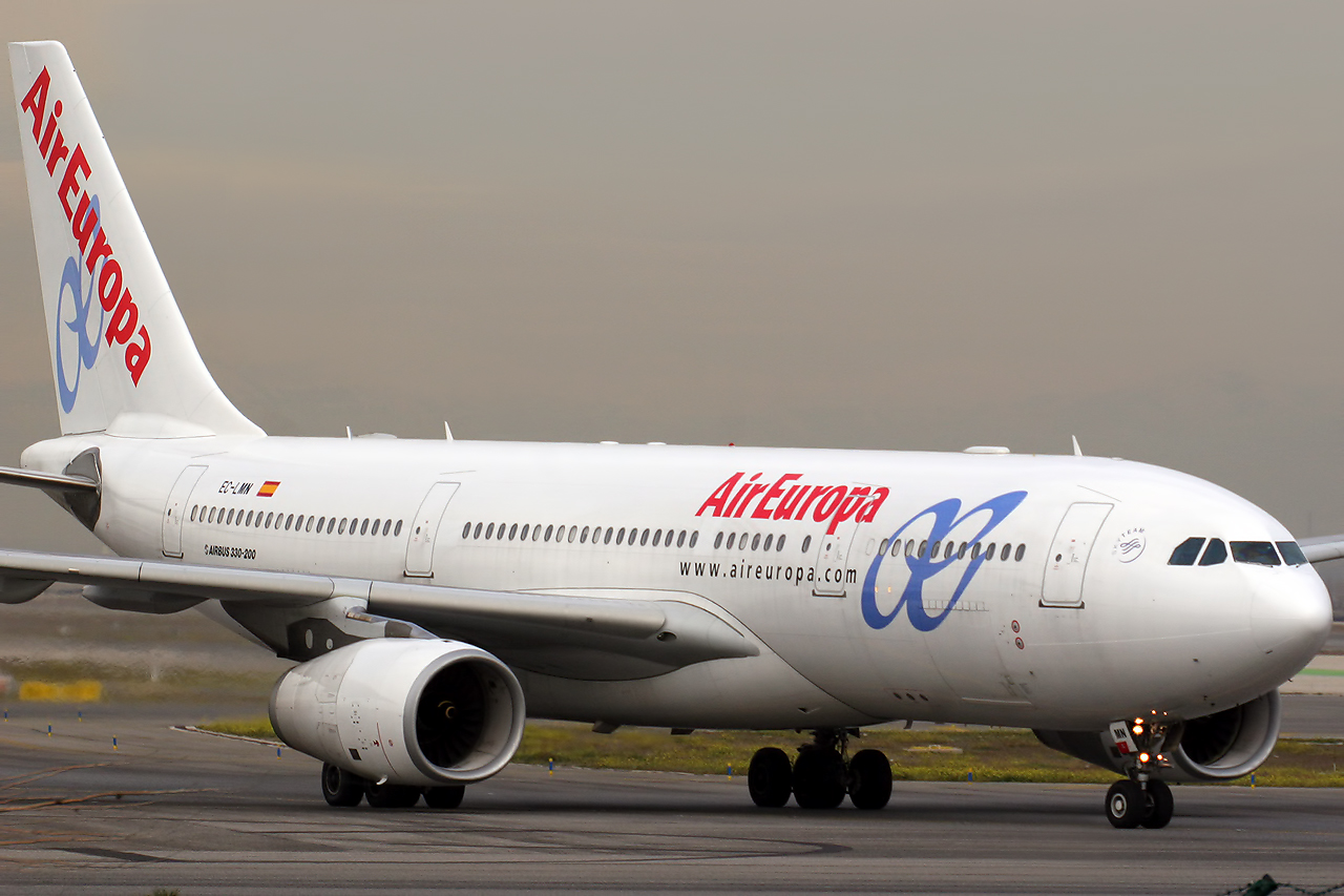 Madrid - Barajas (LEMD/MAD)